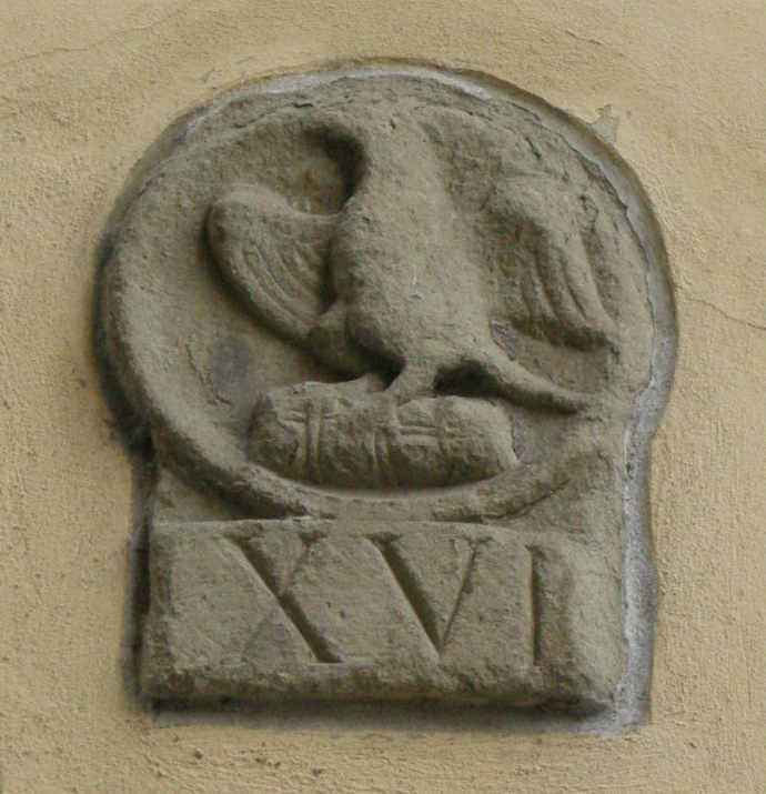 Via de' calzaiuoli, palazzo dell'arte dei mercatanti, stemma